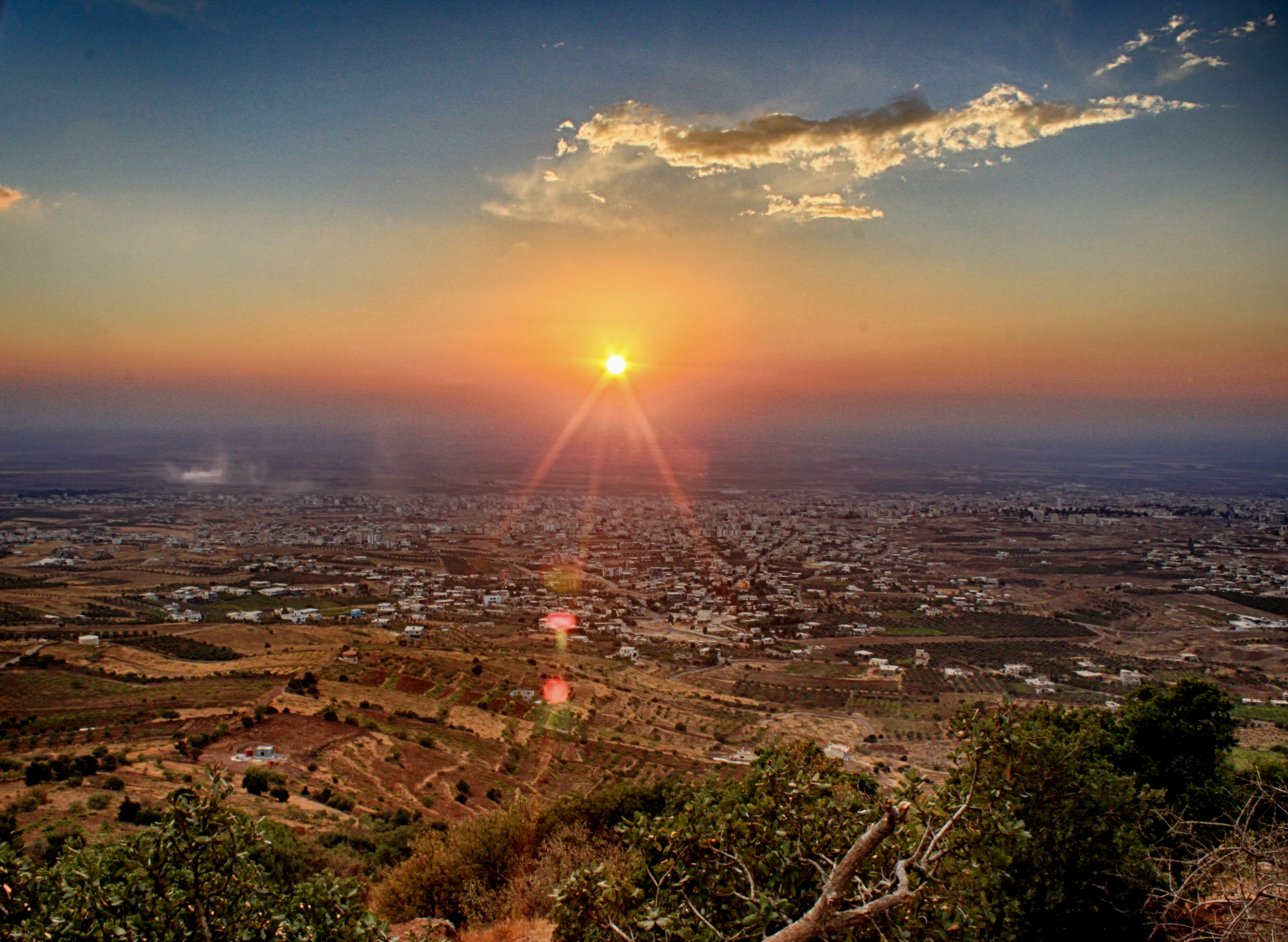 صورة لمدينة السويداء من على تل أحمر -مصاد قبيل الغروب